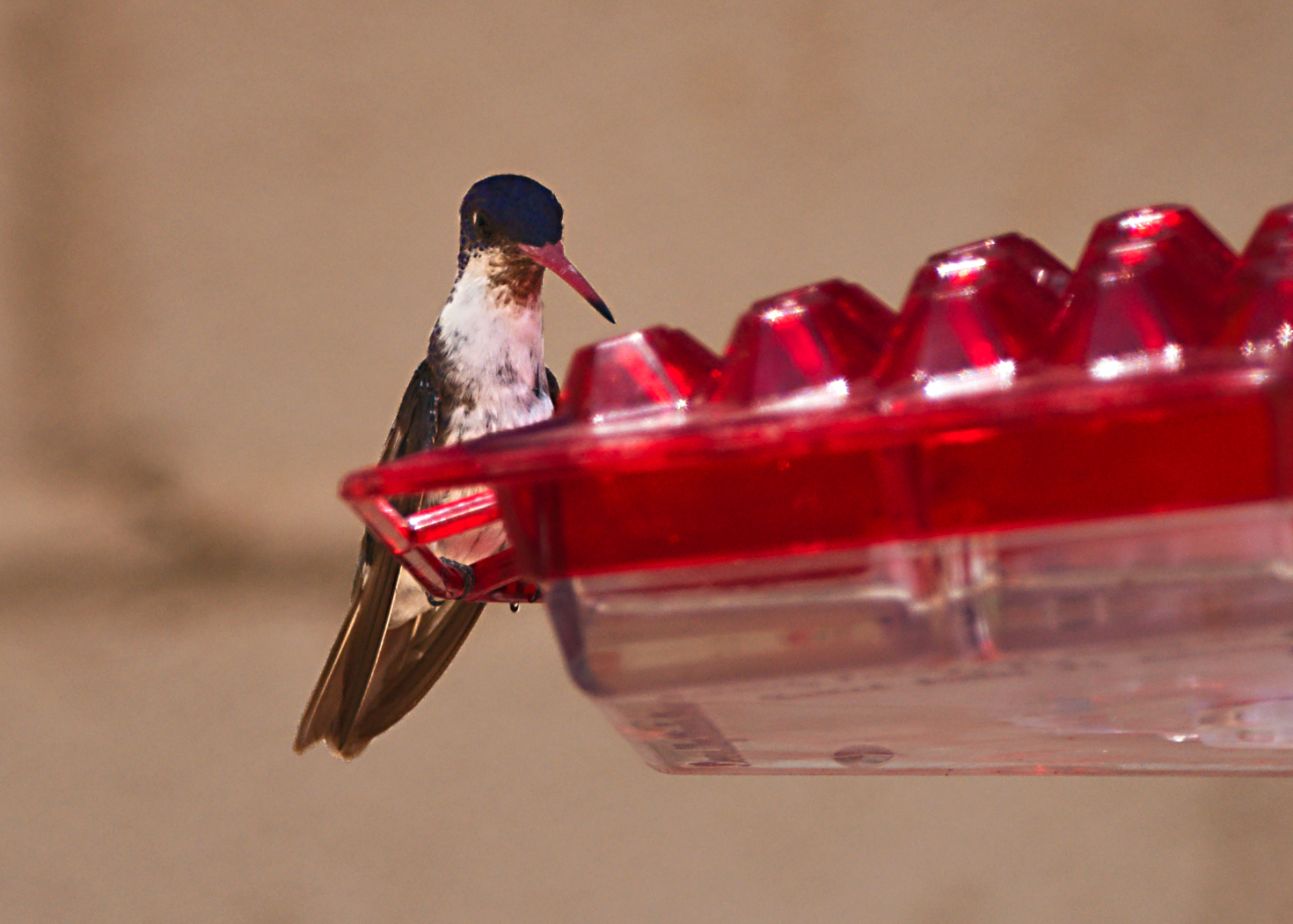 Amazilia violiceps Paton's feeders Patagonia AZ 4.28.11